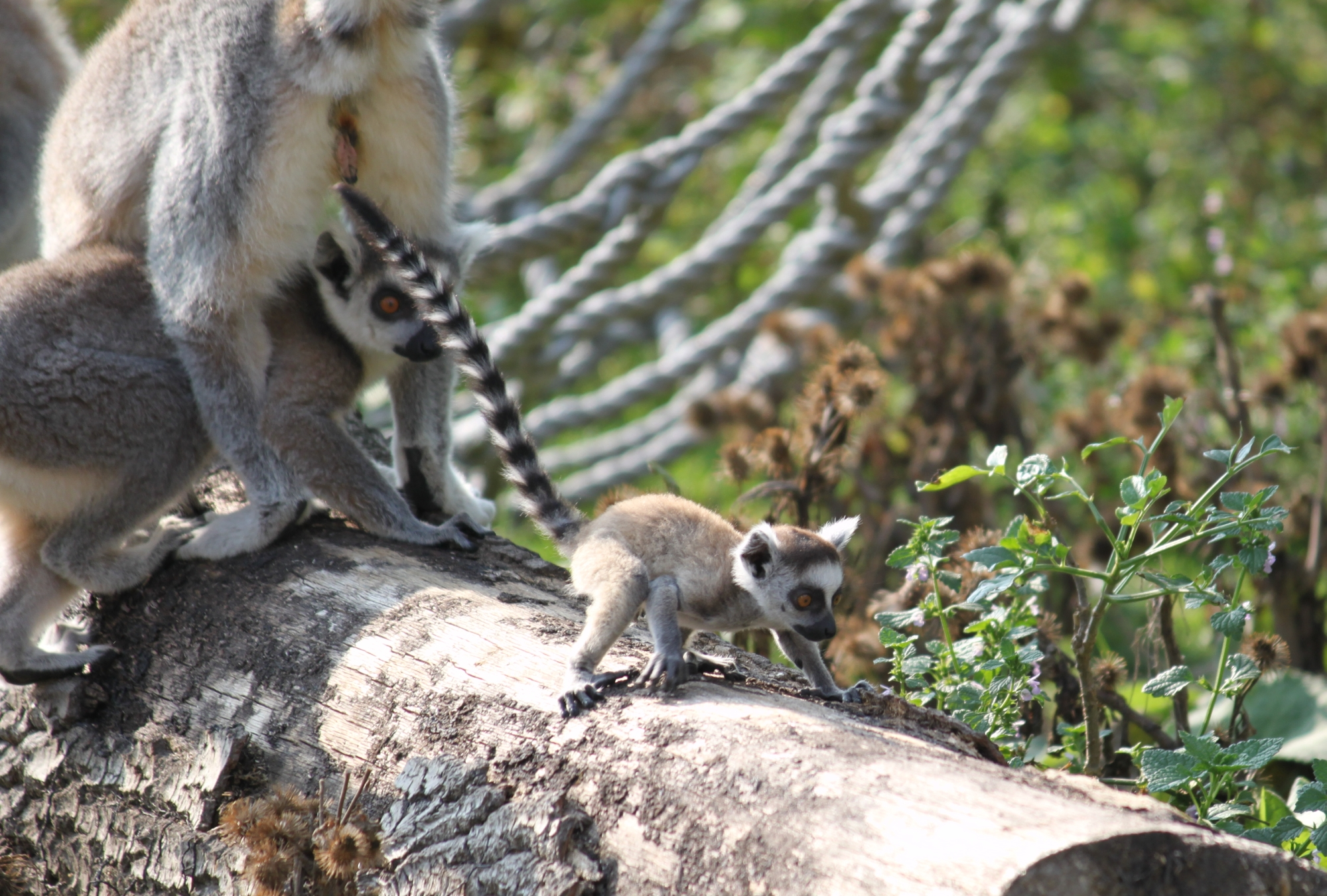 So cute...